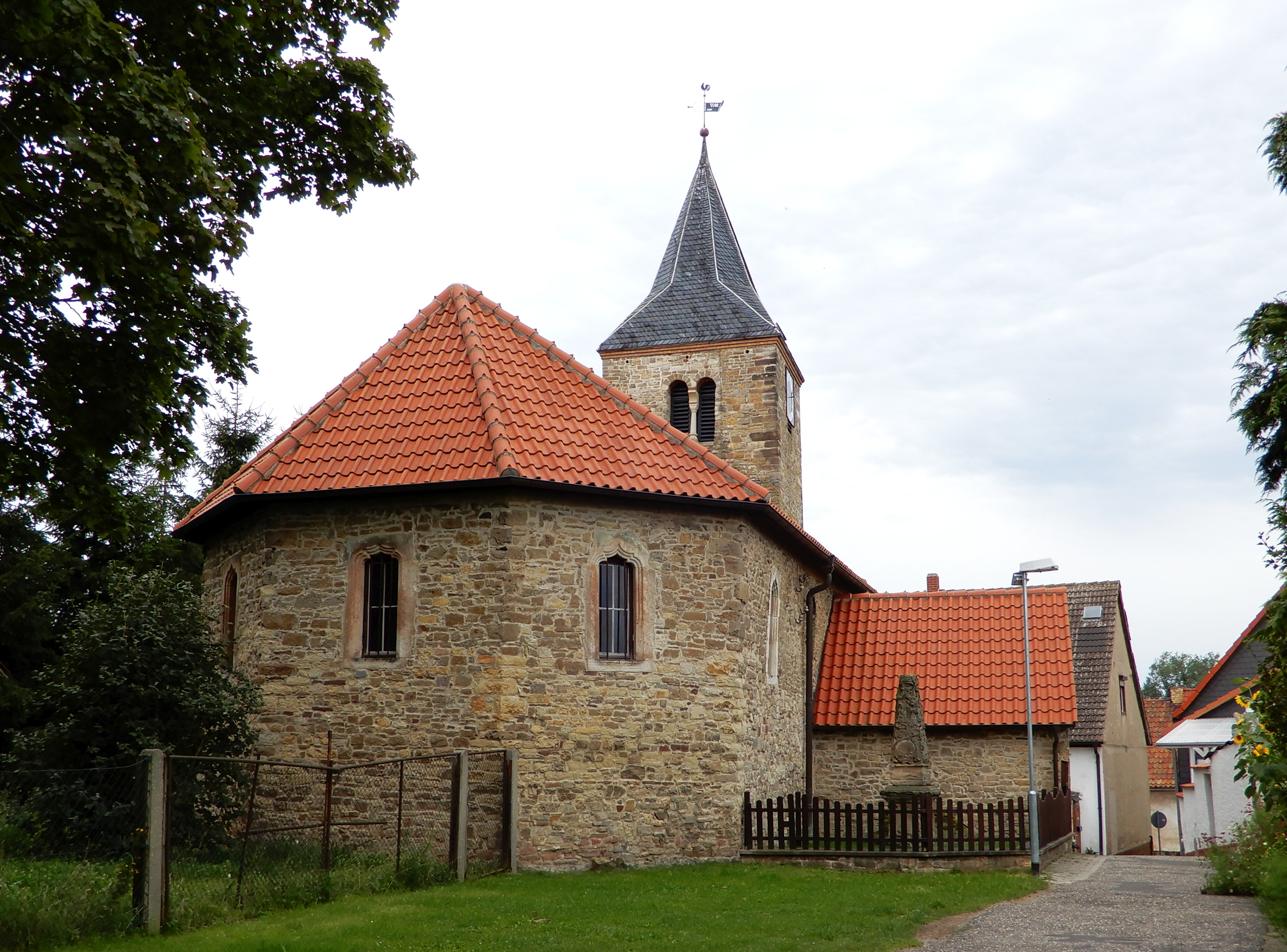 Kirche St. Niklas (Endorf)